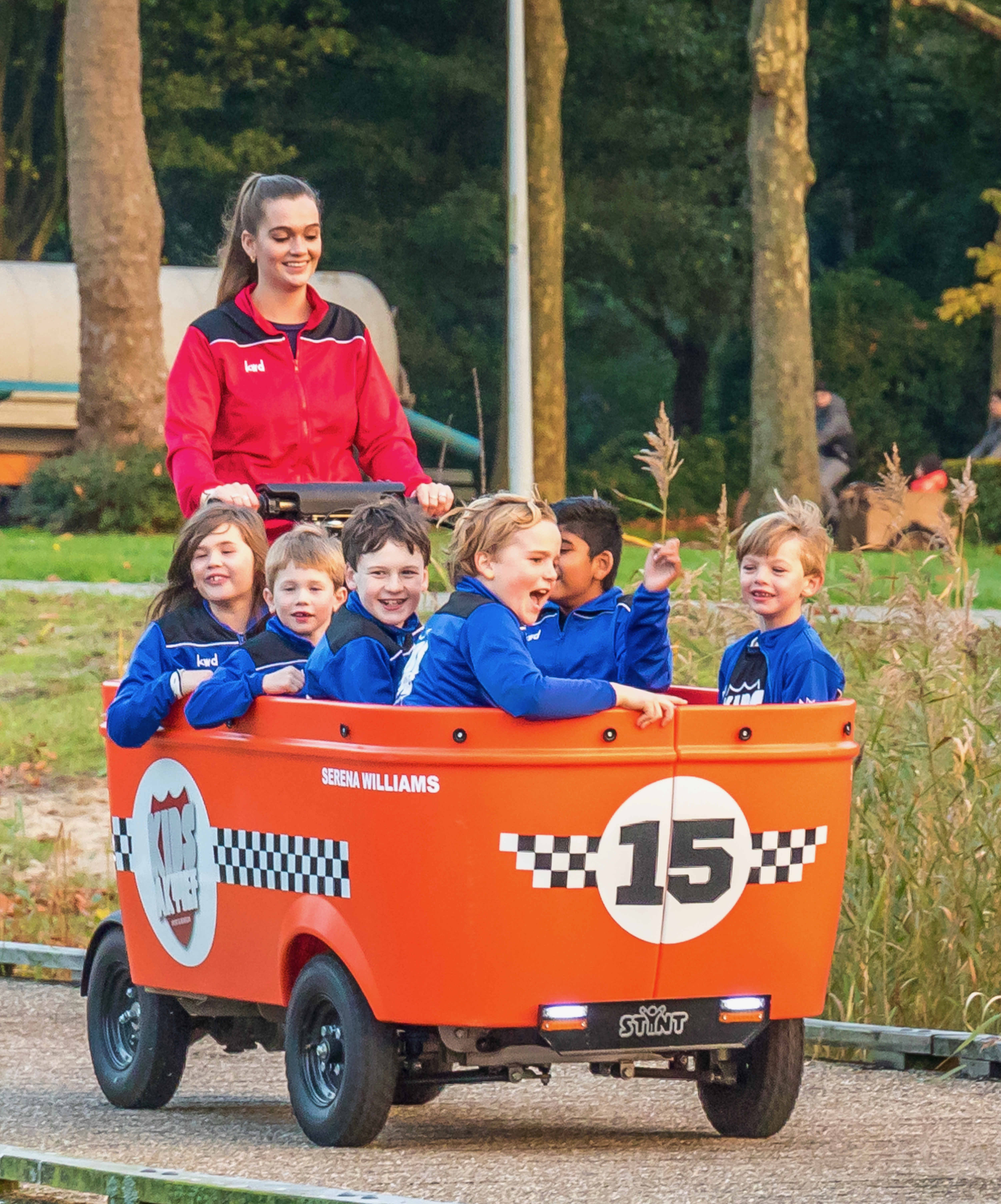 Kids Aktief Stint